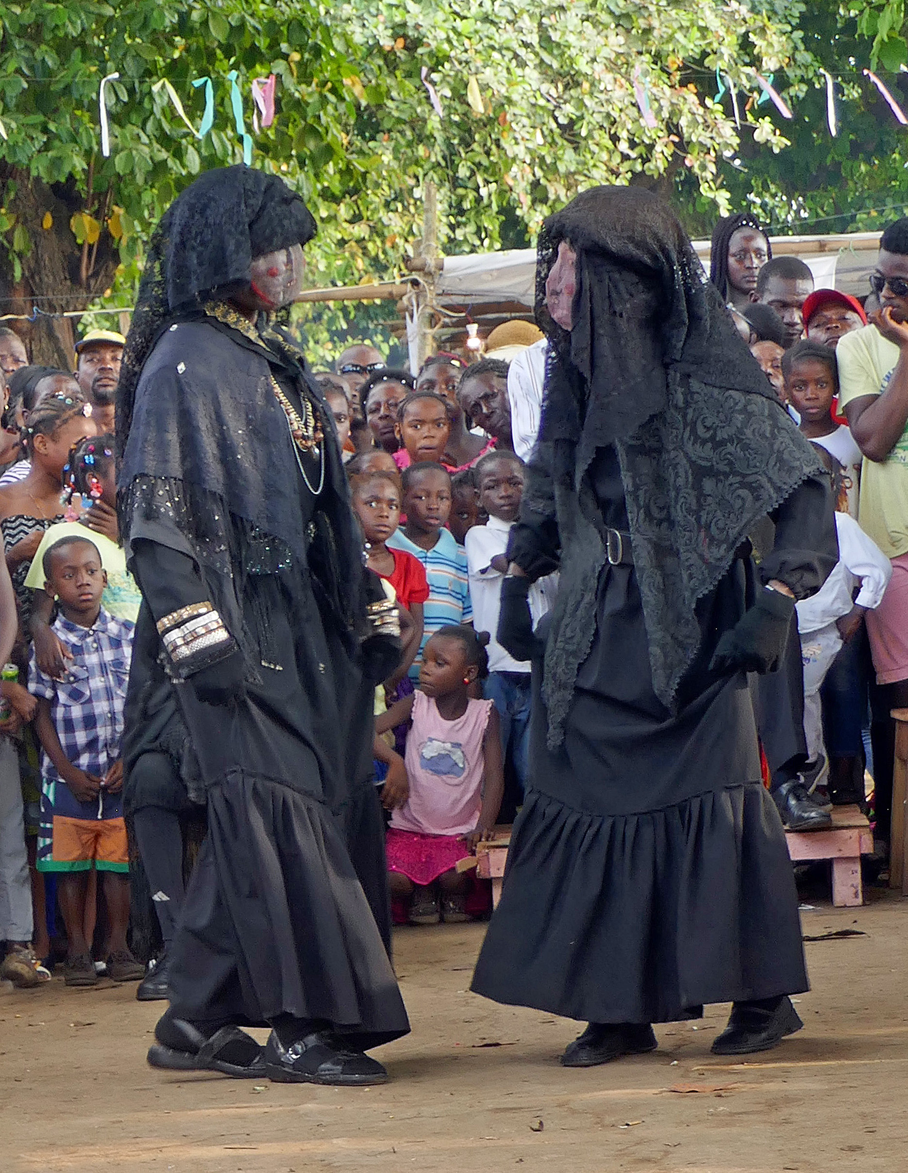 Tchiloli représenté devant l'église São Pedrão de São Tomé à l'occasion de la fête patronale. Ermeline et Sybille, la mère et la veuve de Valdovinos/Baudoin.